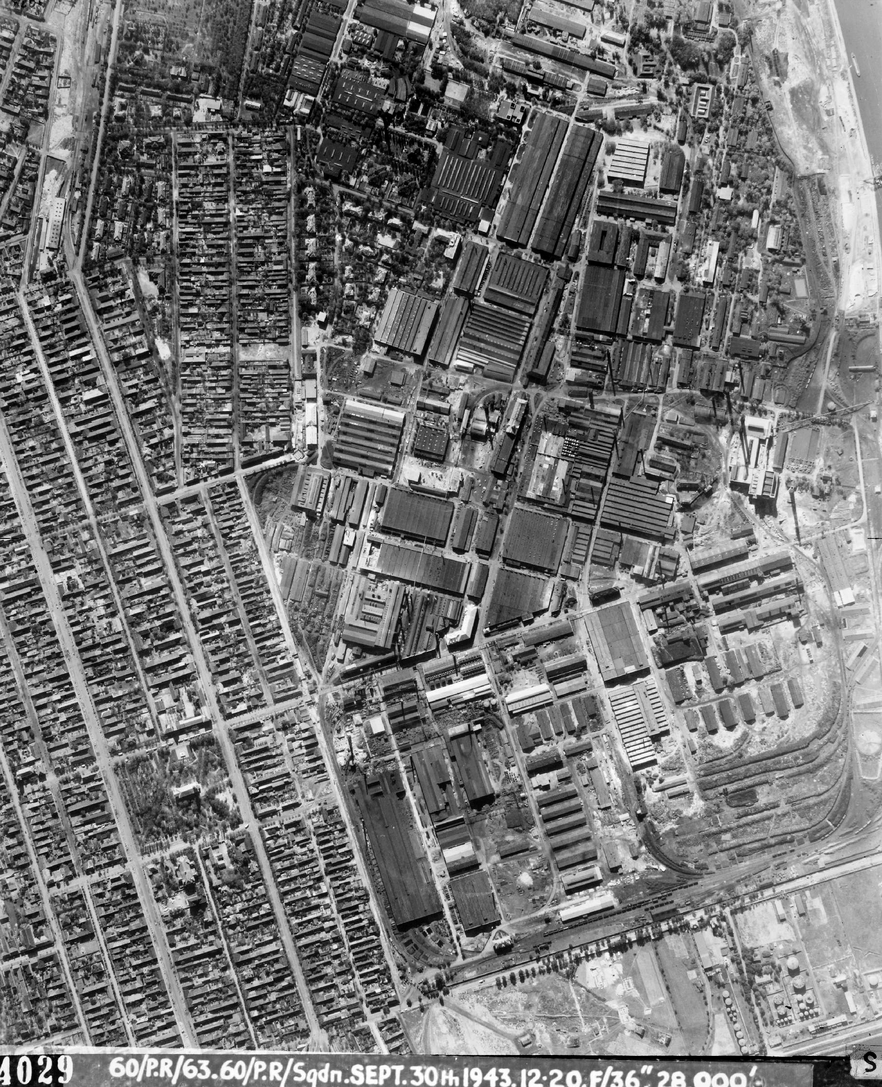 légifotó, Weiss Manfréd Acél- és Fémművek Rt. Location: Hungary, Budapest XXI. Tags: factory, aerial photo, Budapest Title: légifotó, Weiss Manfréd Acél- és Fémművek Rt.